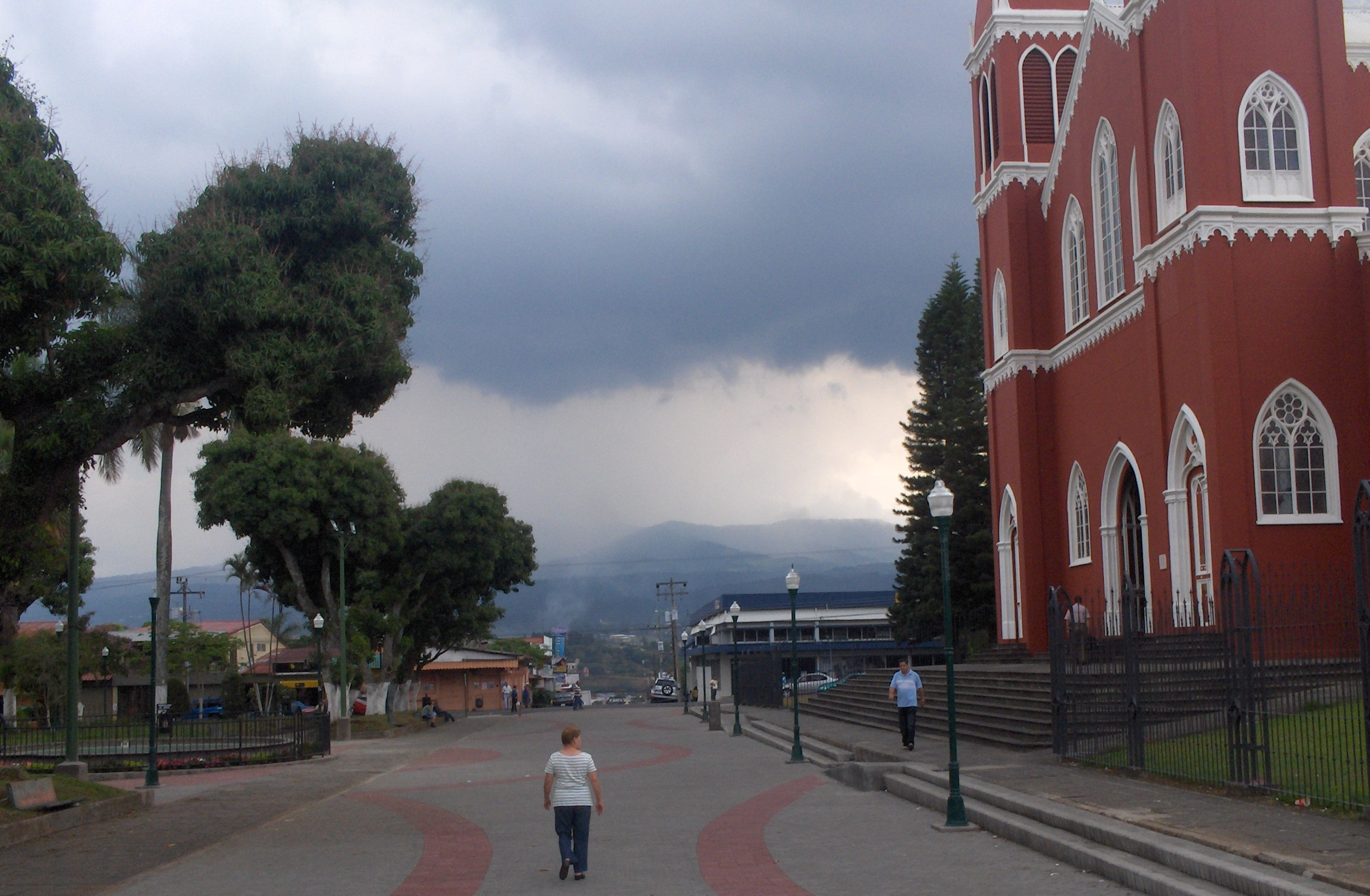 Boulevard Frente de la Parroquia de las Mercedes, Grecia